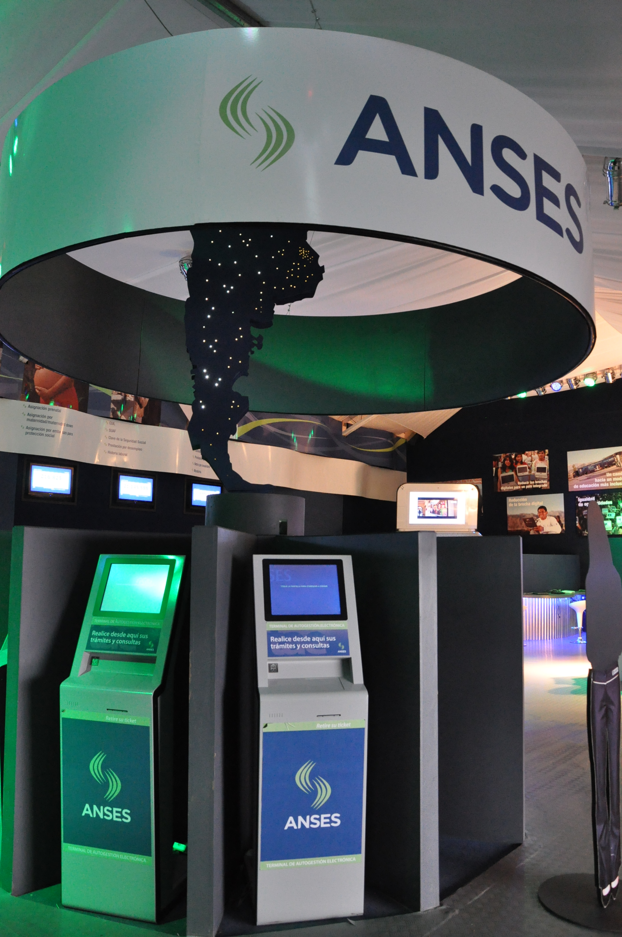 Bajo el lema “La tecnología al servicio de la inclusión”, ANSES participa en la mega muestra con un stand en el que se atienden todo tipo de consultas, de martes a domingos, de 12 a 21 horas. Tecnópolis se lleva a cabo en un predio de más de 50 hectáreas en la localidad bonaerense de Villa Martelli, con entrada abierta y gratuita para todo el público. El espacio de ANSES cuenta con 10 puestos de atención de avanzada, en los que se realizan las cargas de datos personales (ADP) de manera digital. Los mismos quedan grabados en el sistema con foto y huella digital.